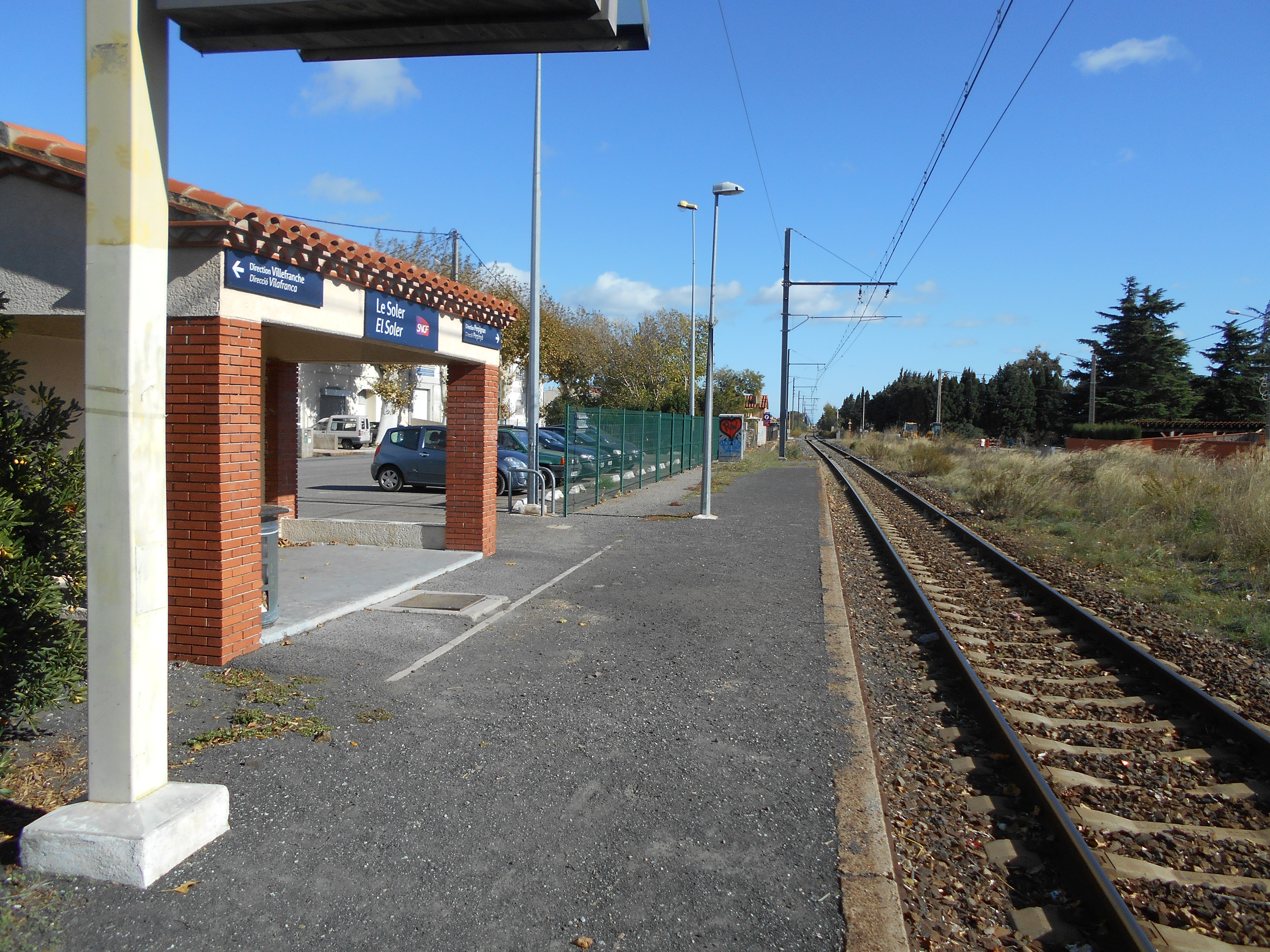 Estació del Soler